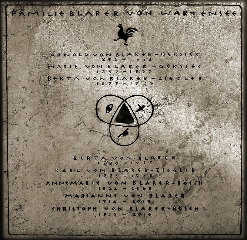 Karl von Blarer (1885–1978) Dr.jur., Rechtsanwalt, CVP Politiker, Mitglied in vielen Kommissionen. Familiengrab, Blarer von Wartensee auf dem Friedhof von Aesch, Basel-Landschaft, Schweiz